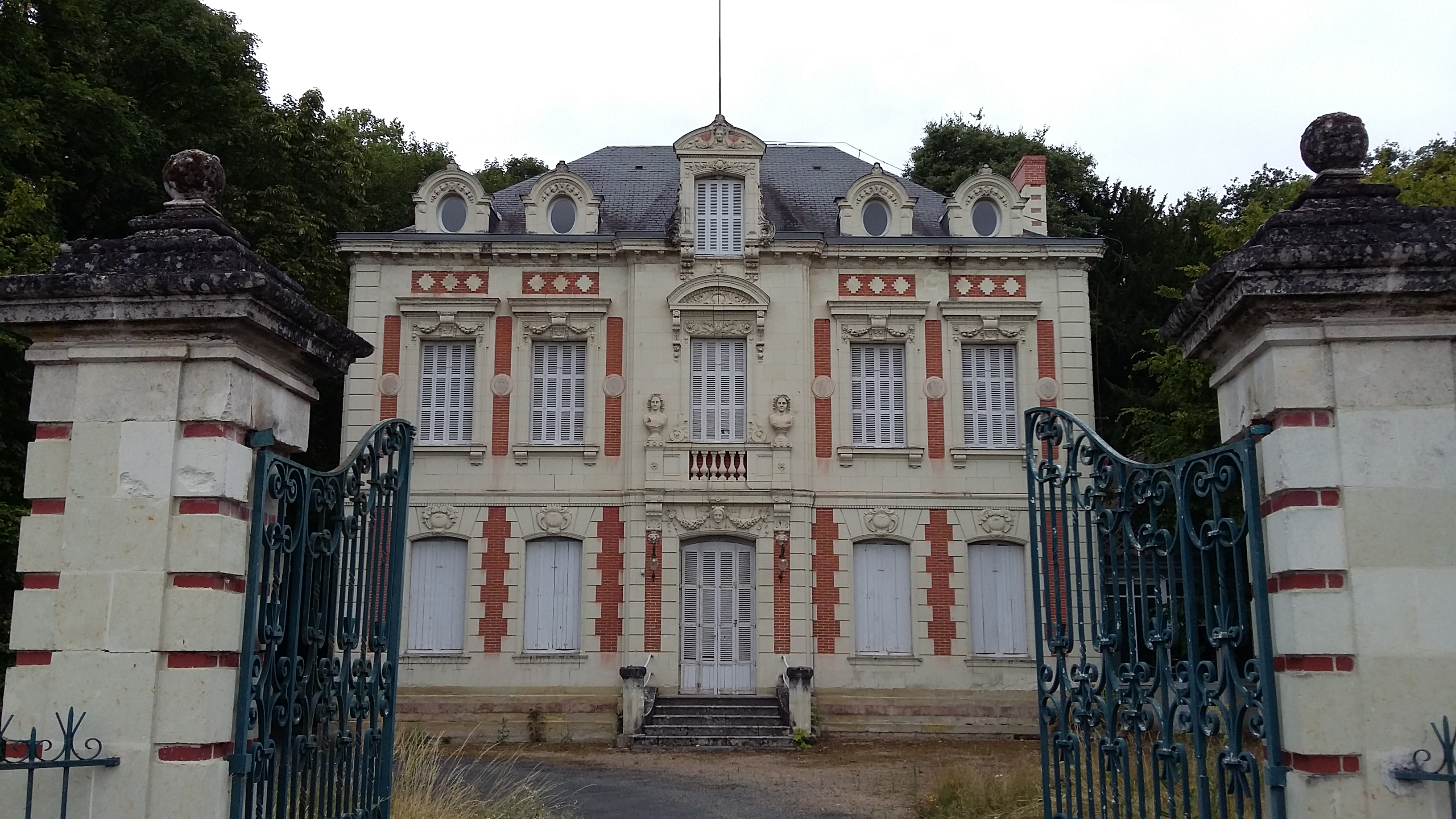 Façade du château de la Caillerie à Avoine (Indre-et-Loire). Édifié en 1863.